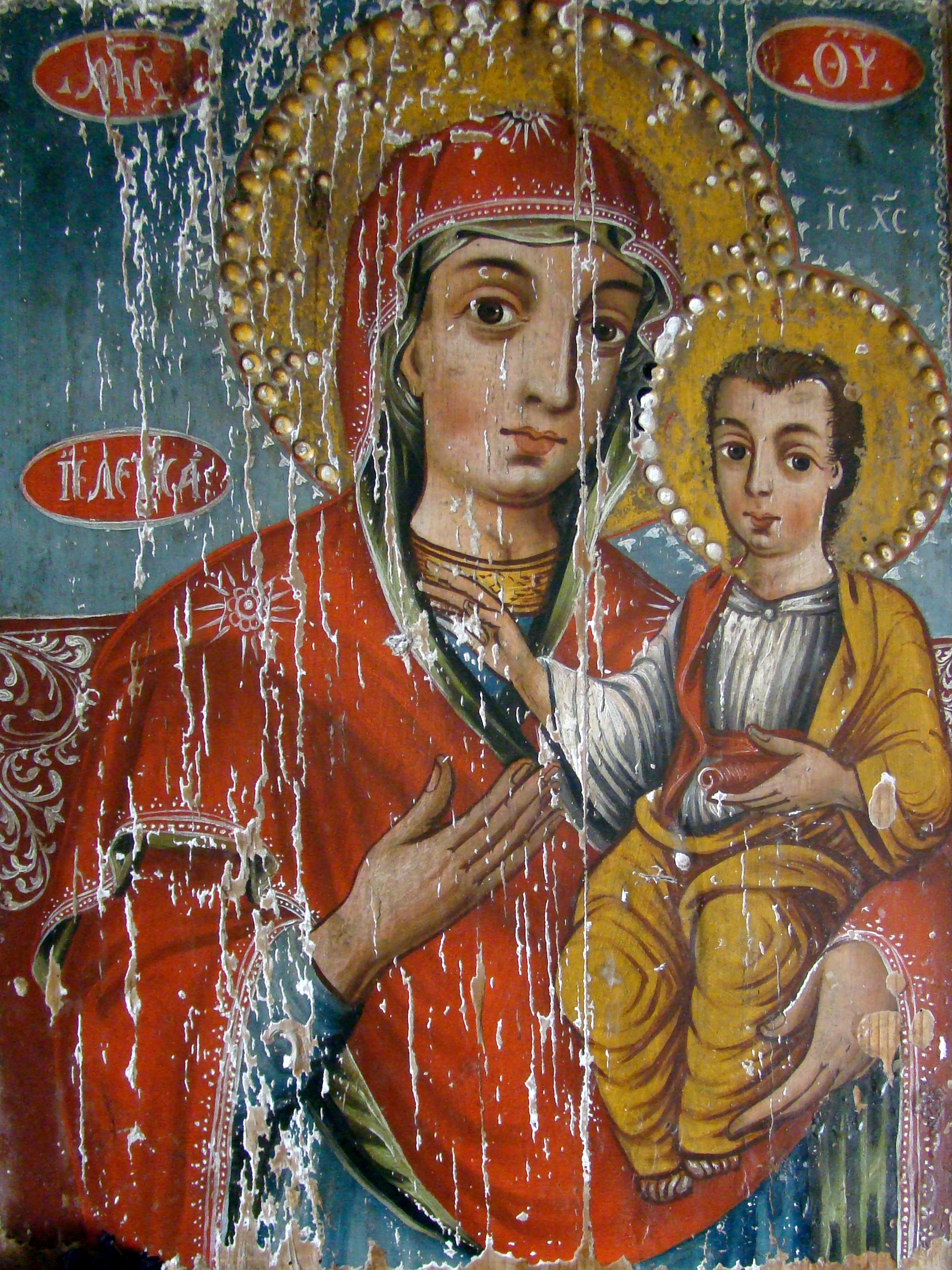 Dealu Geoagiului, județul Alba